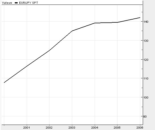 Evolution Yen-Euro 2000-2006